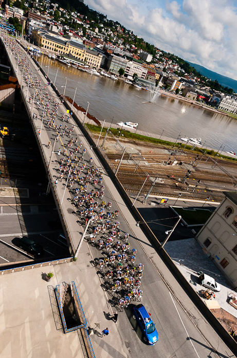 Starten over bybrua